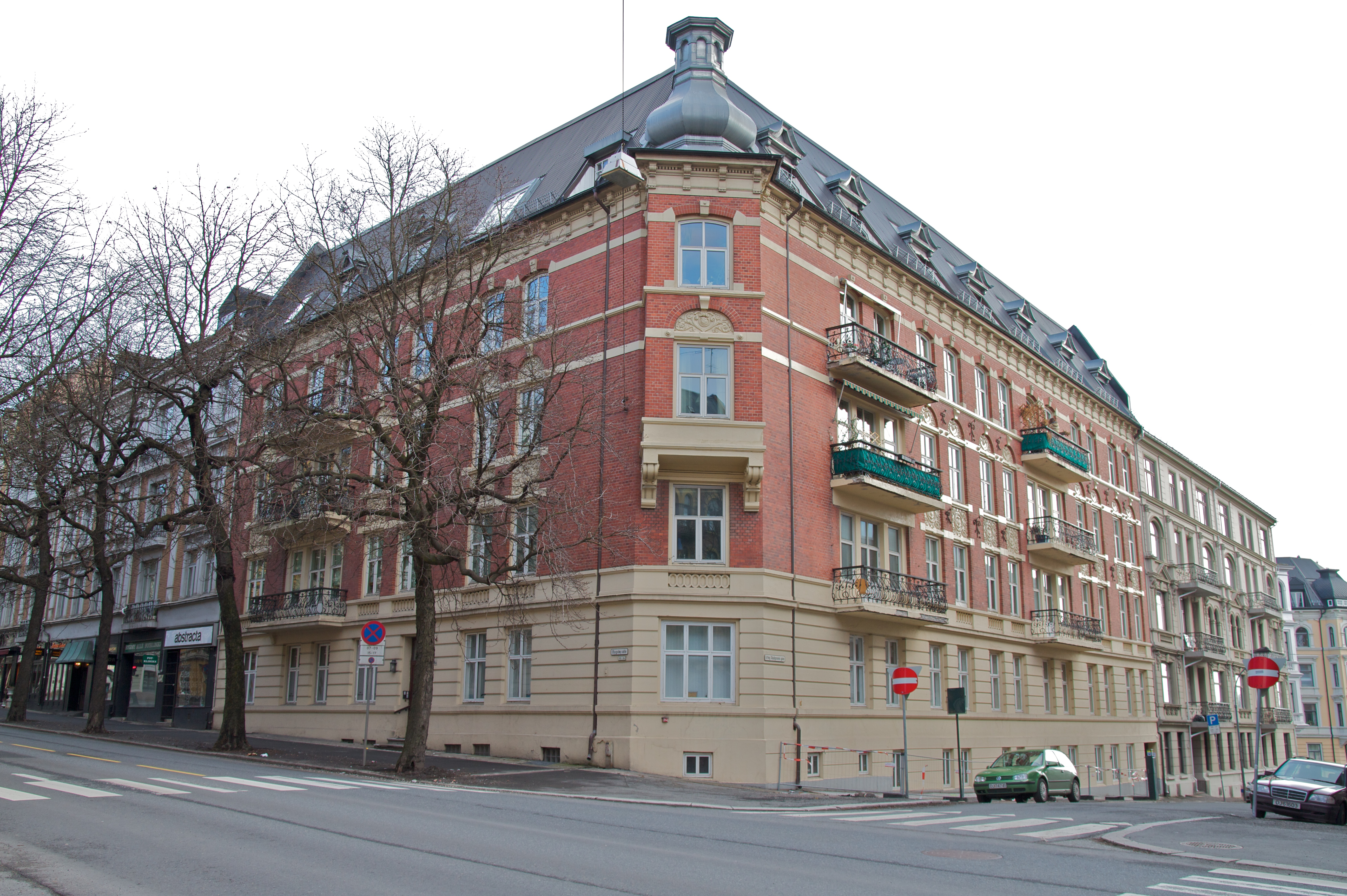 Bygdøy allé 64. Frogner i Oslo.